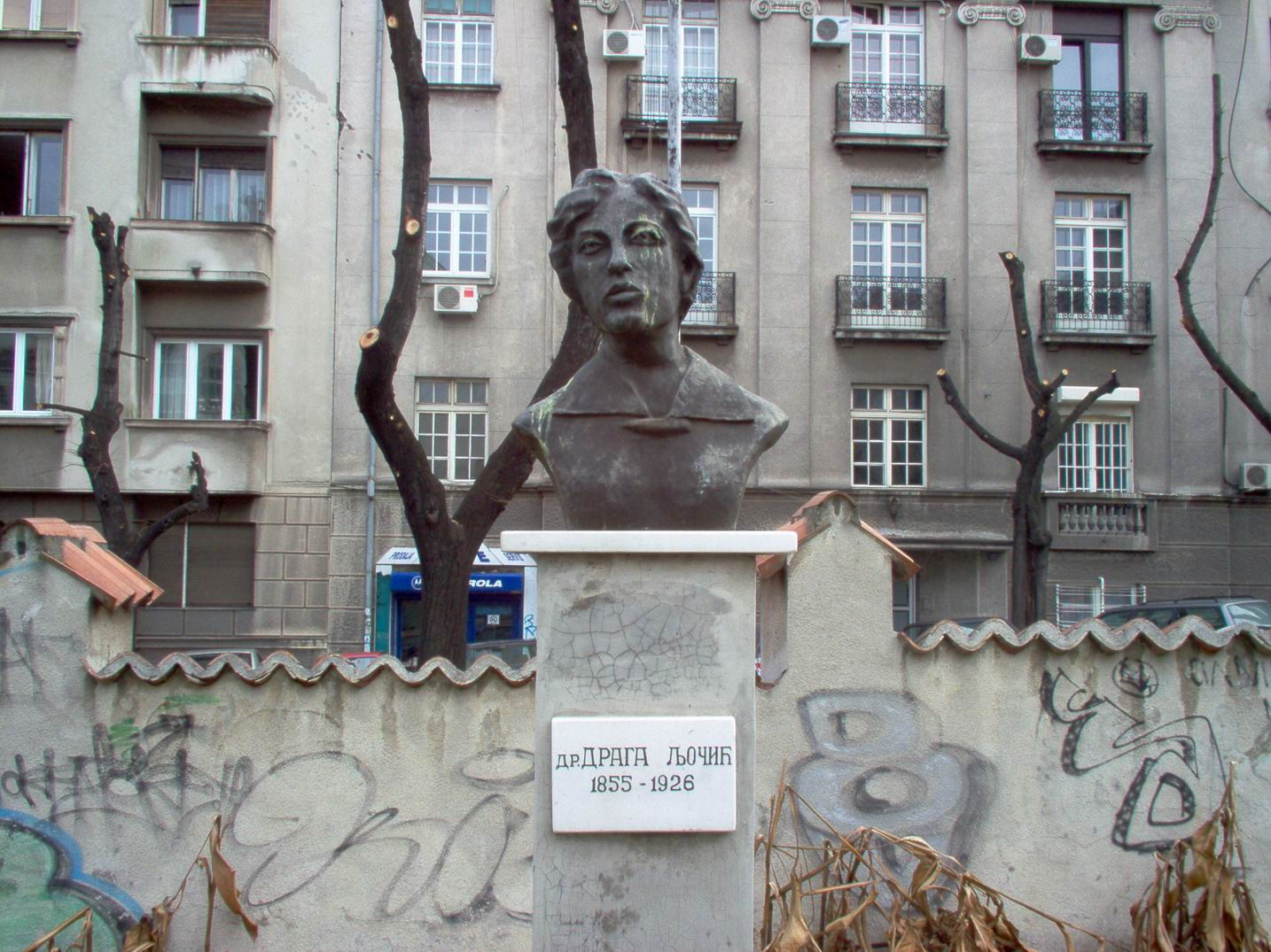 Споменик Др Драга Љочић, споменик је у кругу бивше очне клинике у улици Џорџа Вашингтона, фотографисао Голдфингер